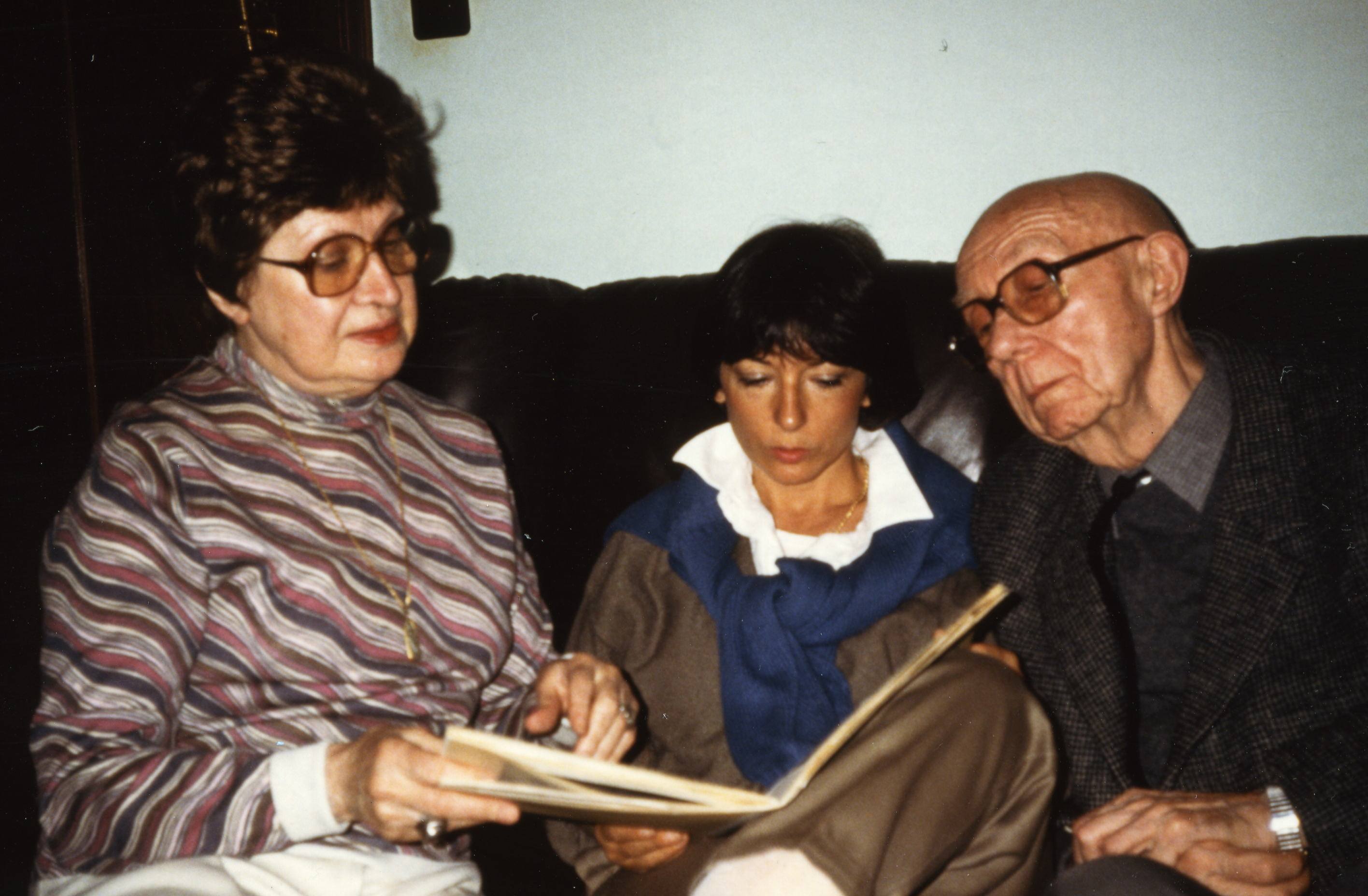 Irène Hamoir, une amie et Louis Scutenaire dans leur maison rue de la Luzerne à Bruxelles en 1985